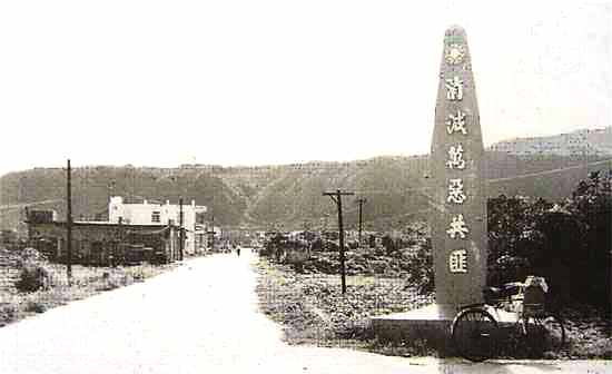 臺灣人民要隨時「殺朱拔毛」